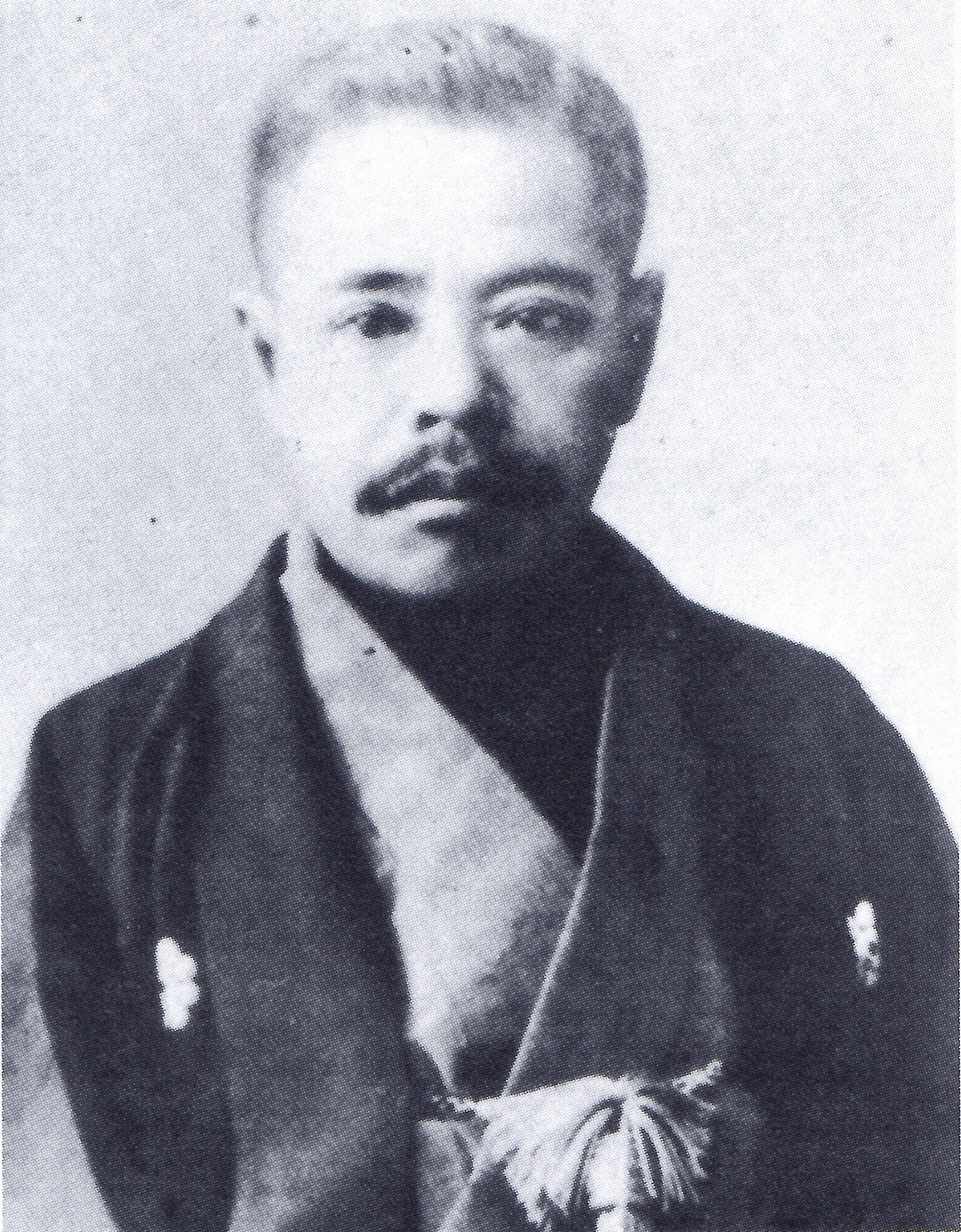 吉川経健の肖像写真。